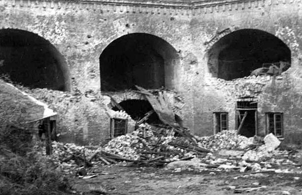 вид на казематы внутренней подковы после боёв 1941 год